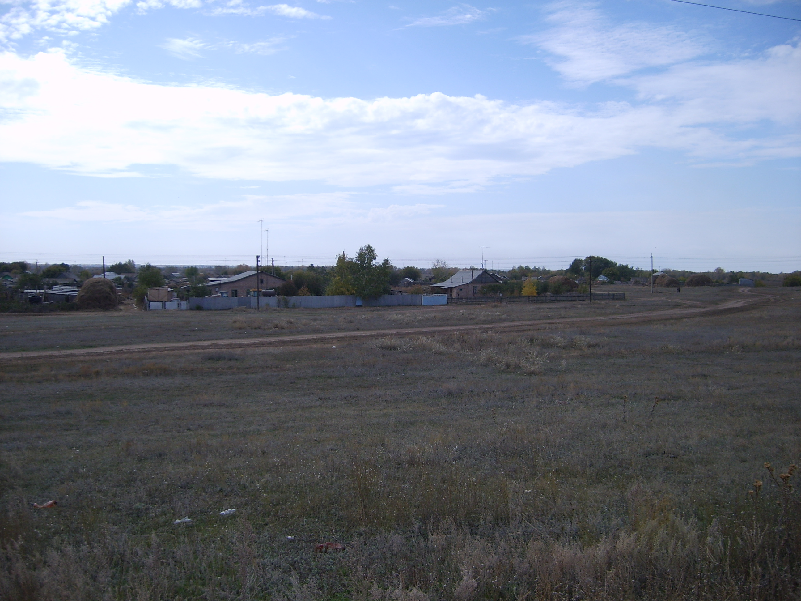 Два домика